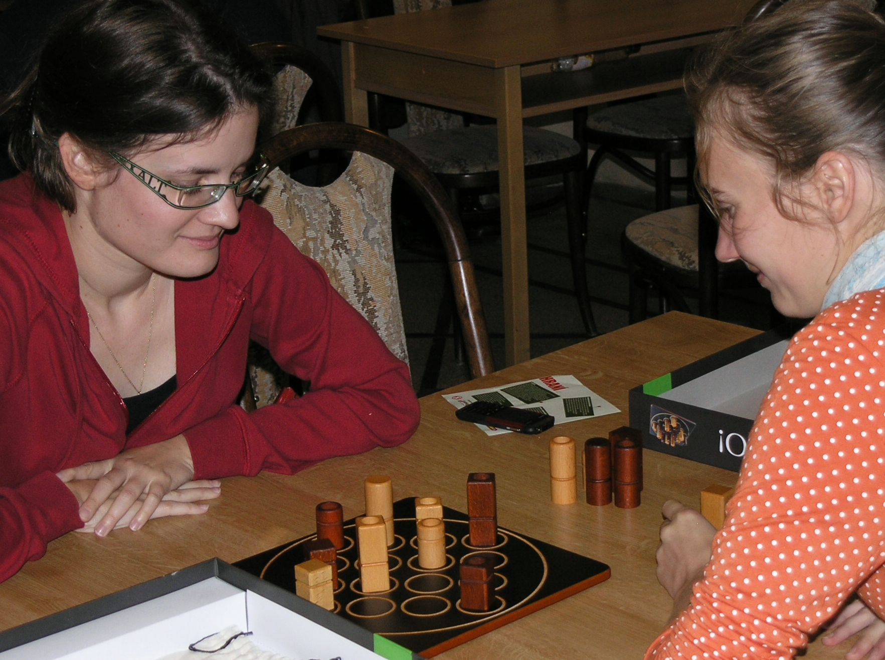 Herní festival Deskohraní 2008 - Quarto!